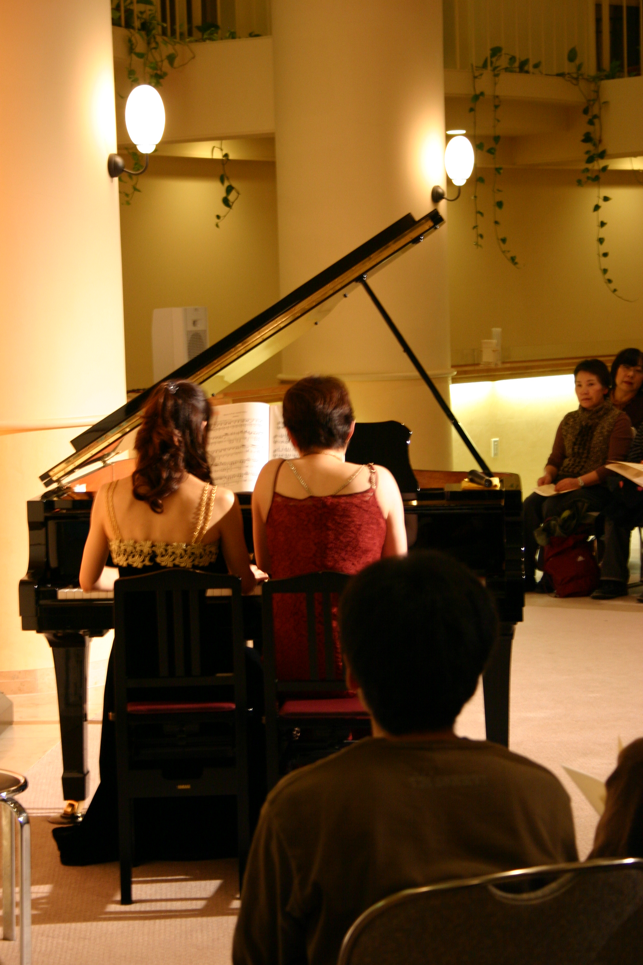 Piano Play 4 hands